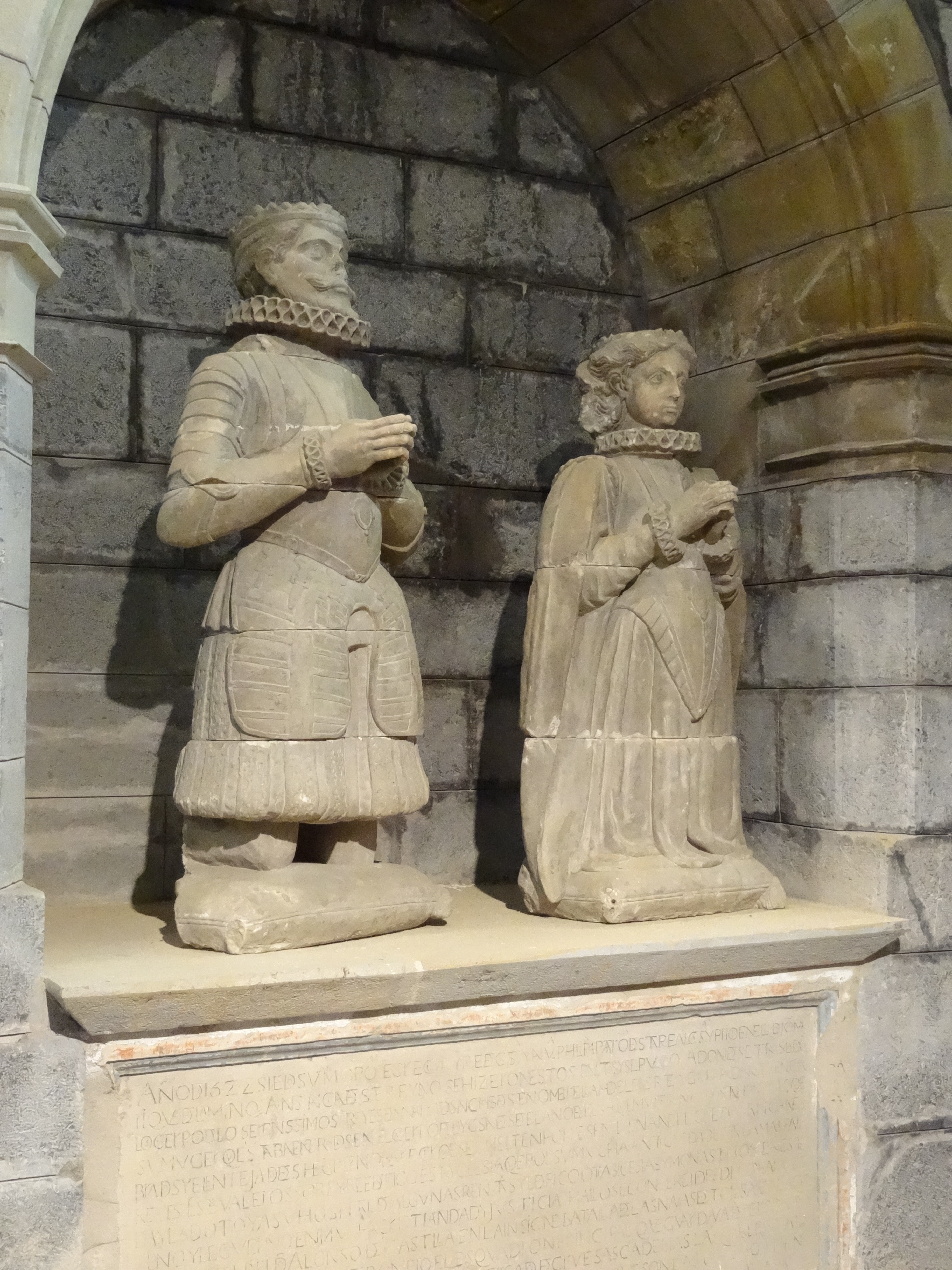 Estatuas orantes de los reyes Sancho VII y su esposa doña Clemencia.